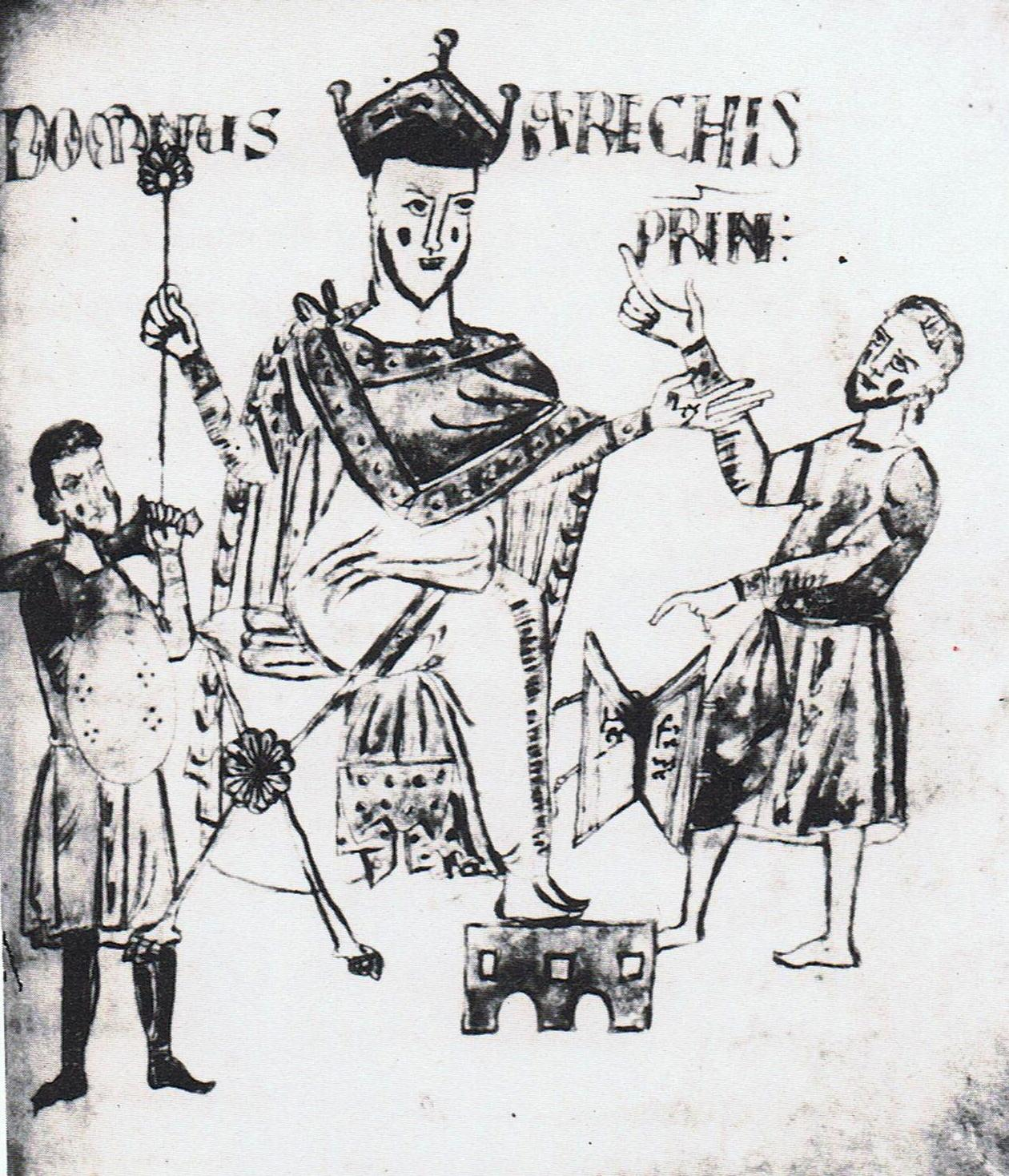 Miniatura raffigurante Arechi, Principe di Benevento, con un dignitario e un uomo d'arme.